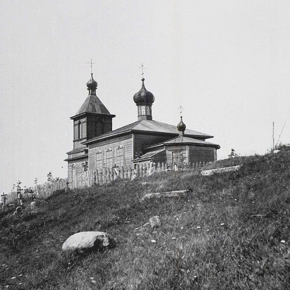 Беларуская (тарашкевіца): Чэрніхава Верхняе (Černichava Vierchniaje). Царква-мураўёўка